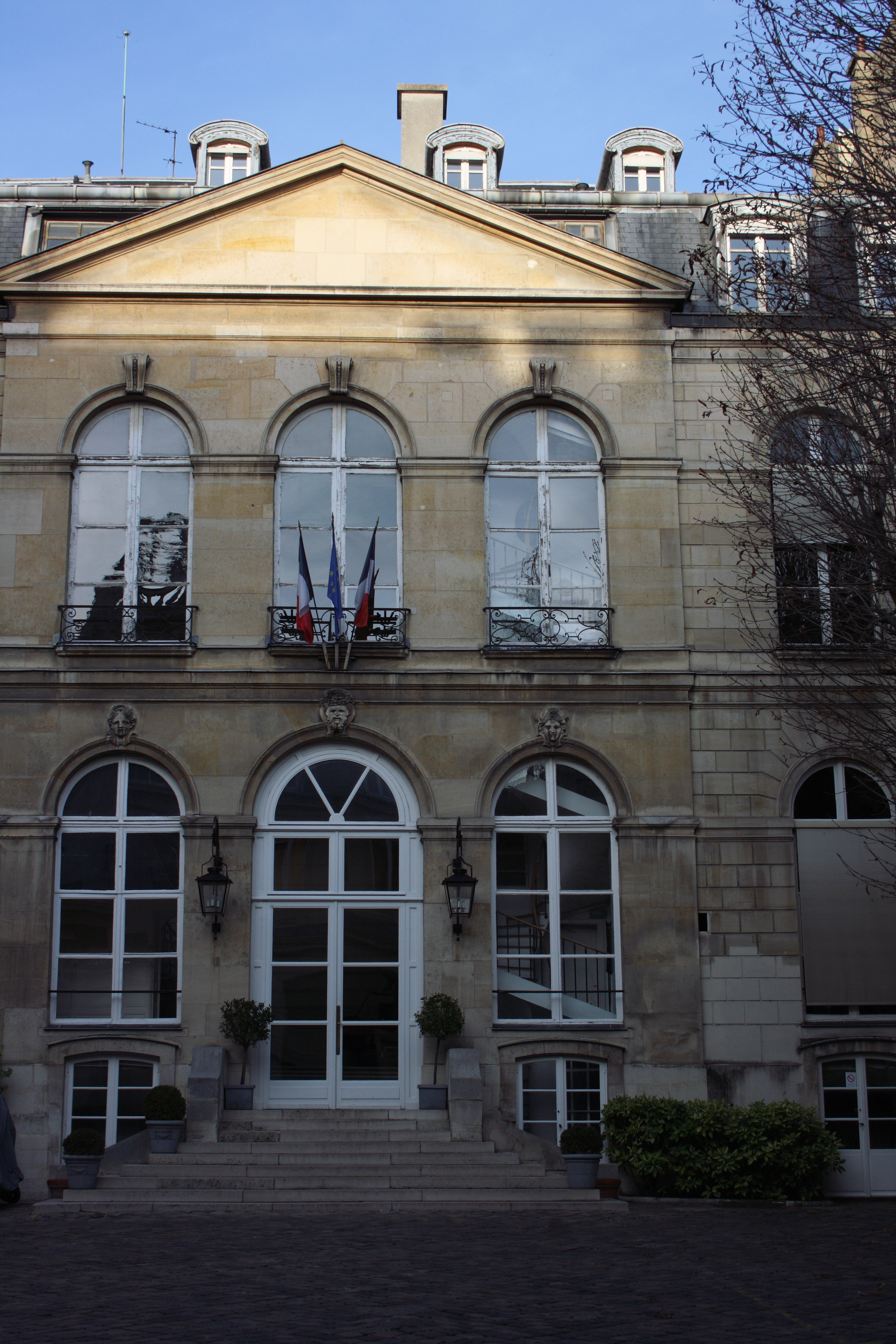 Hôtel de Seignelay in Paris (7. Arrondissement), 80 rue de Lille